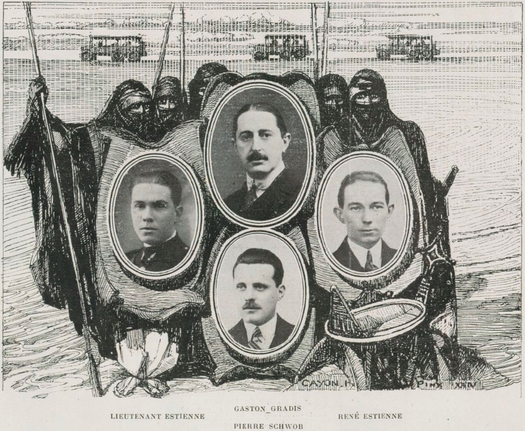 Mission Gradis (La Presse coloniale illustrée)